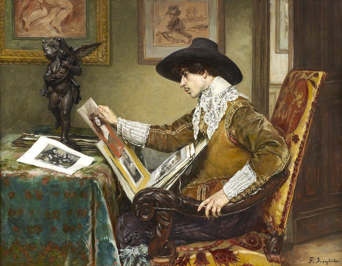 Ferdinand Roybet, the Connoisseur.jpg